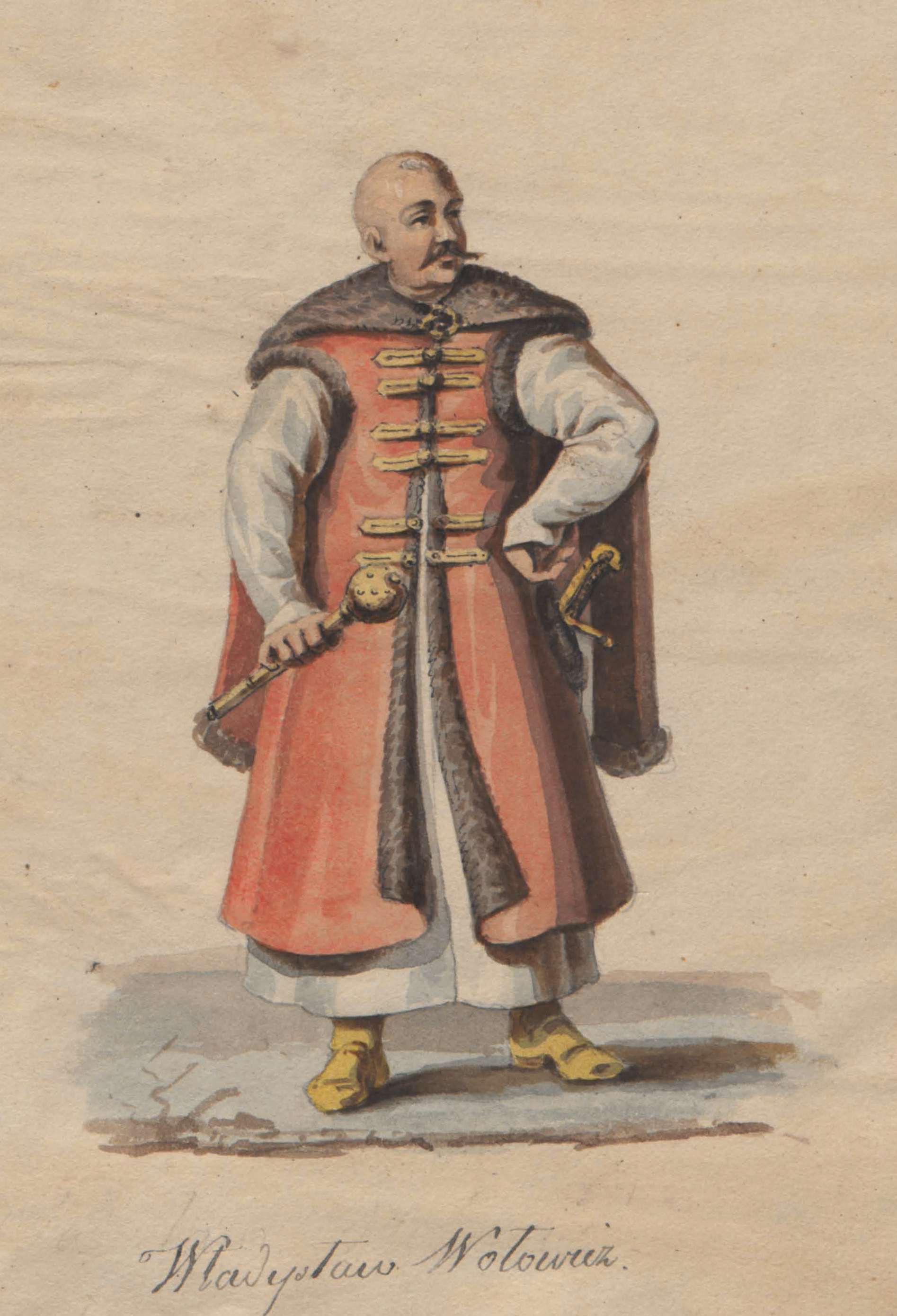 Беларуская (тарашкевіца): Партрэт Уладзіслава Валовіча (Uładzisłaŭ Vałovič), напісаны паводле партрэта Яна Альбрэхта Радзівіла (Jan Albrecht Radzivił)